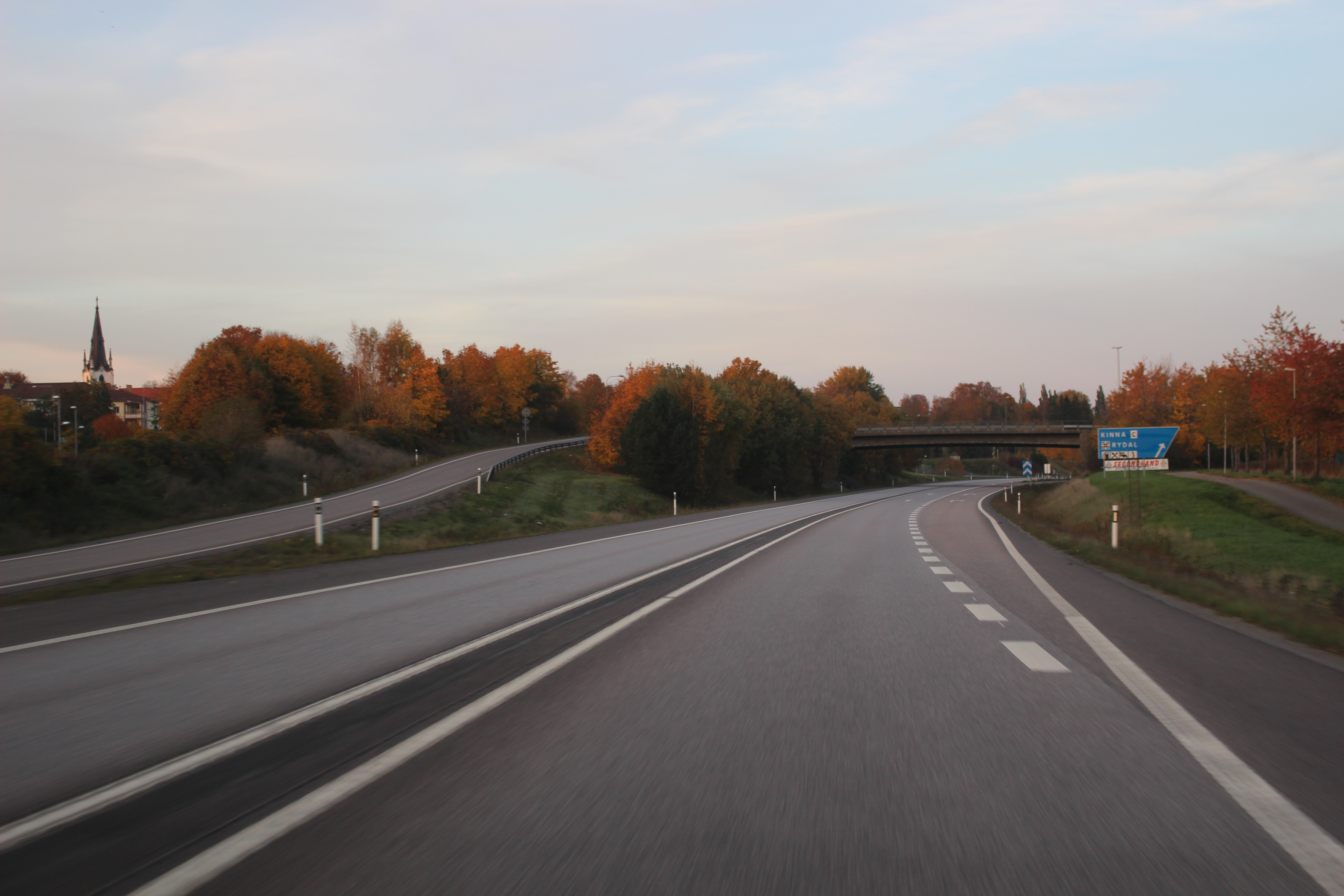 Riksväg 41 mot nordost. Kinna kyrka syns till vänster.